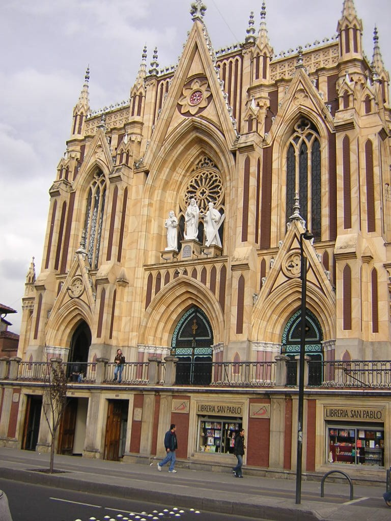 Iglesia Nuestra Señora de Chiquinquirá, Bogotá, Cundinamarca, Colombia